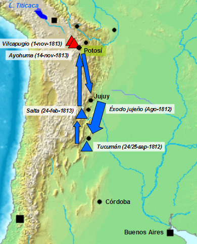 Mapa sobre el Ejército del Norte (Argentina, Guerra de Independencia Hispanoamericana). Segunda Campaña al Alto Perú (1812-1813). Las batallas están señaladas con triángulos: rojos para las victorias realistas (Imperio Español), azules para las victorias independentistas (Junta de Buenos Aires). Las flechas azules representan los movimientos del Ejército del Norte.